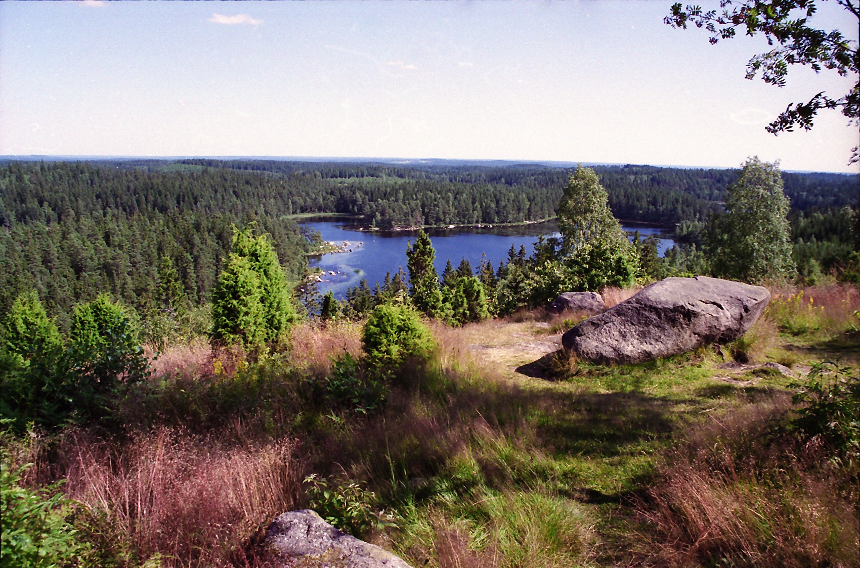 Utsikten från Hultaklint, Bergs socken, Småland.